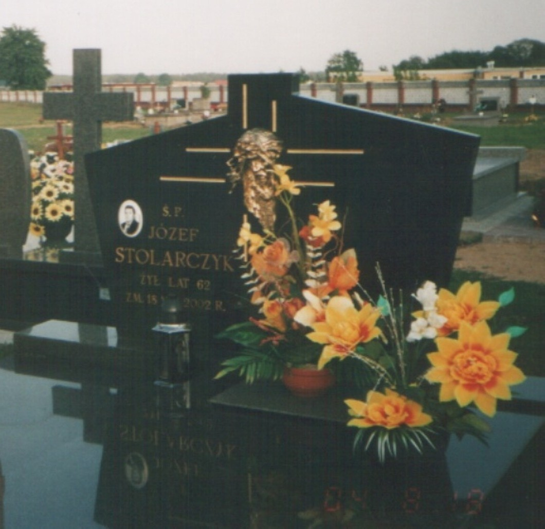 Przasnysz. Józef Stolarczyk